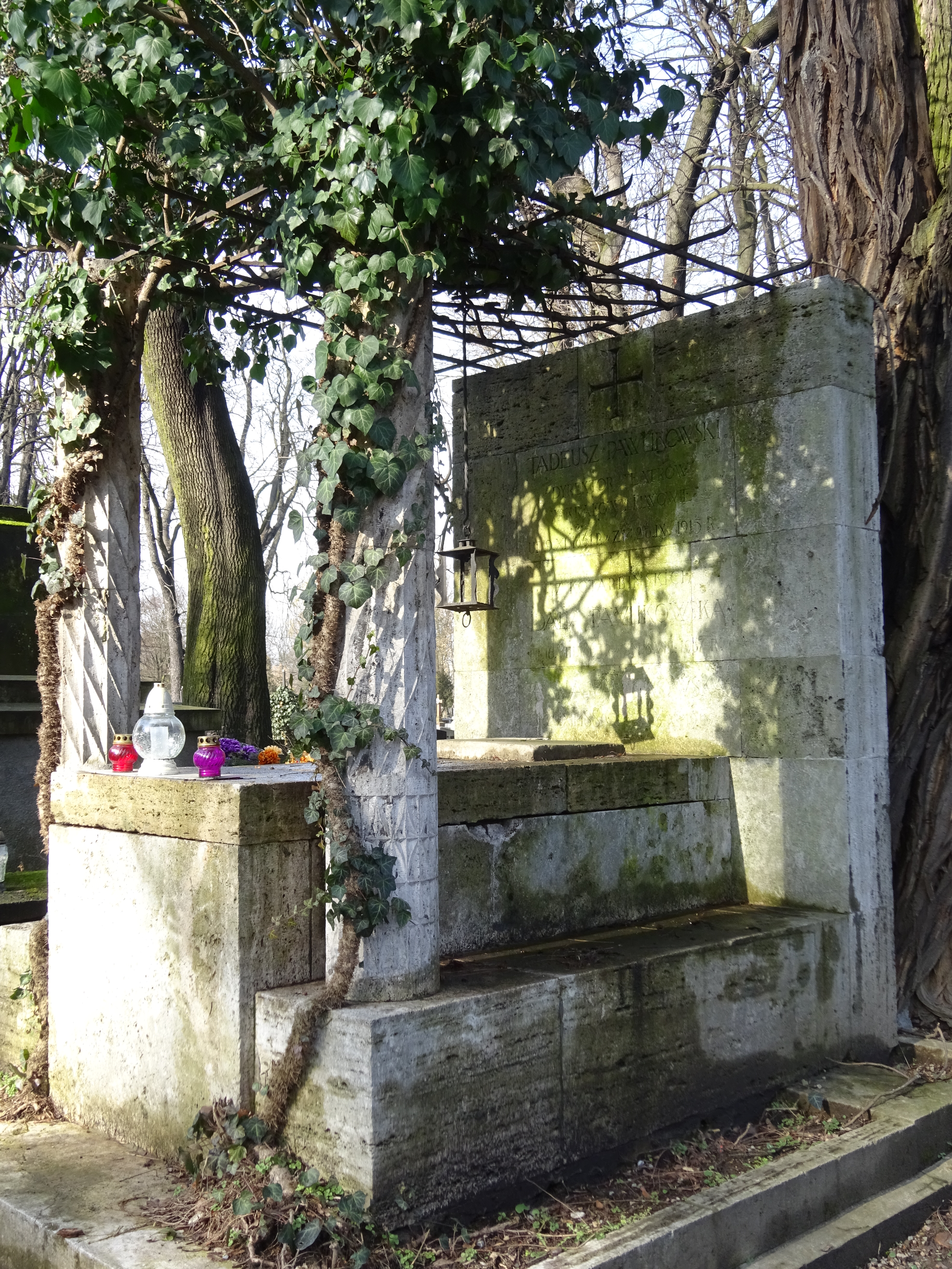 Grobowiec Tadeusza Pawlikowskiego na Cmentarzu Rakowickim w Krakowie.